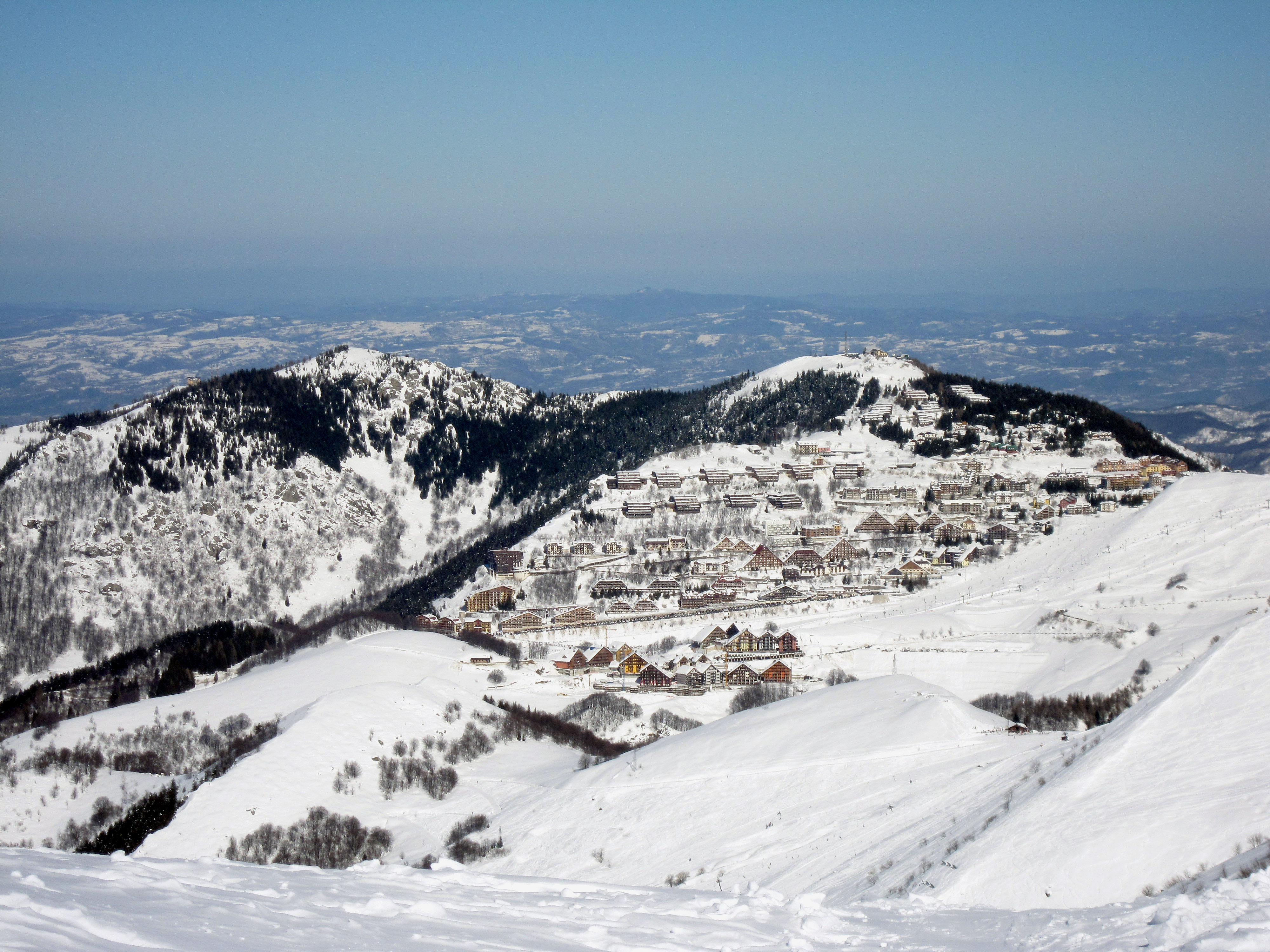 Veduta del comprensorio sciistico di Prato Nevoso nelle Alpi Marittime.